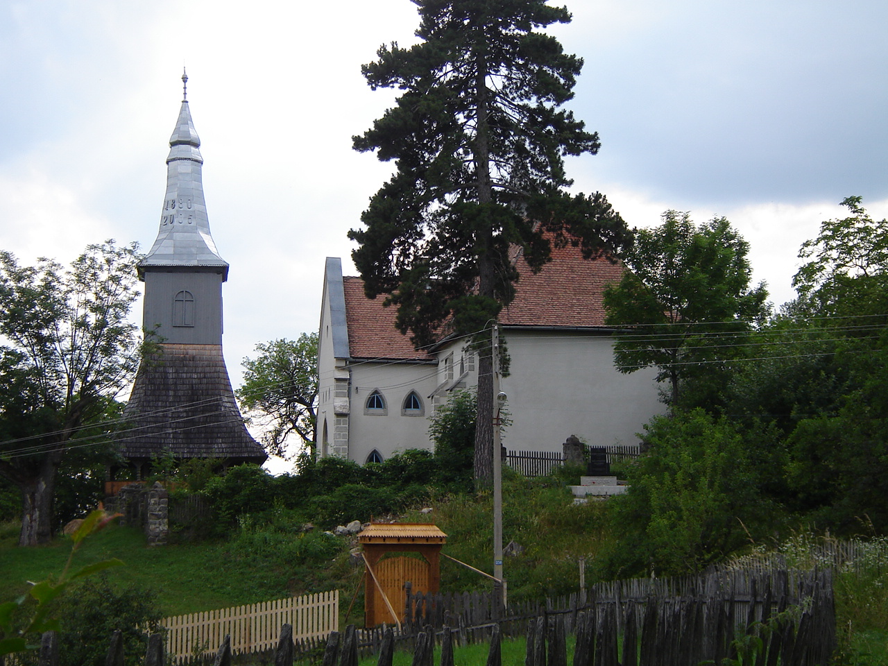 Siklód református templomaRomână: Biserica reformată din Şiclod, judeţul Harghita, România